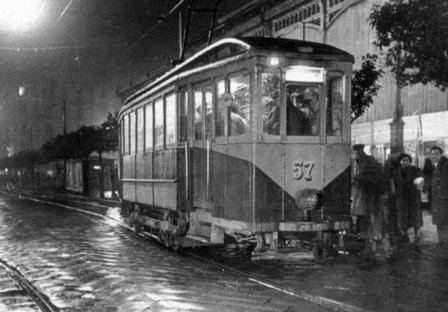 La Spezia Tram 57